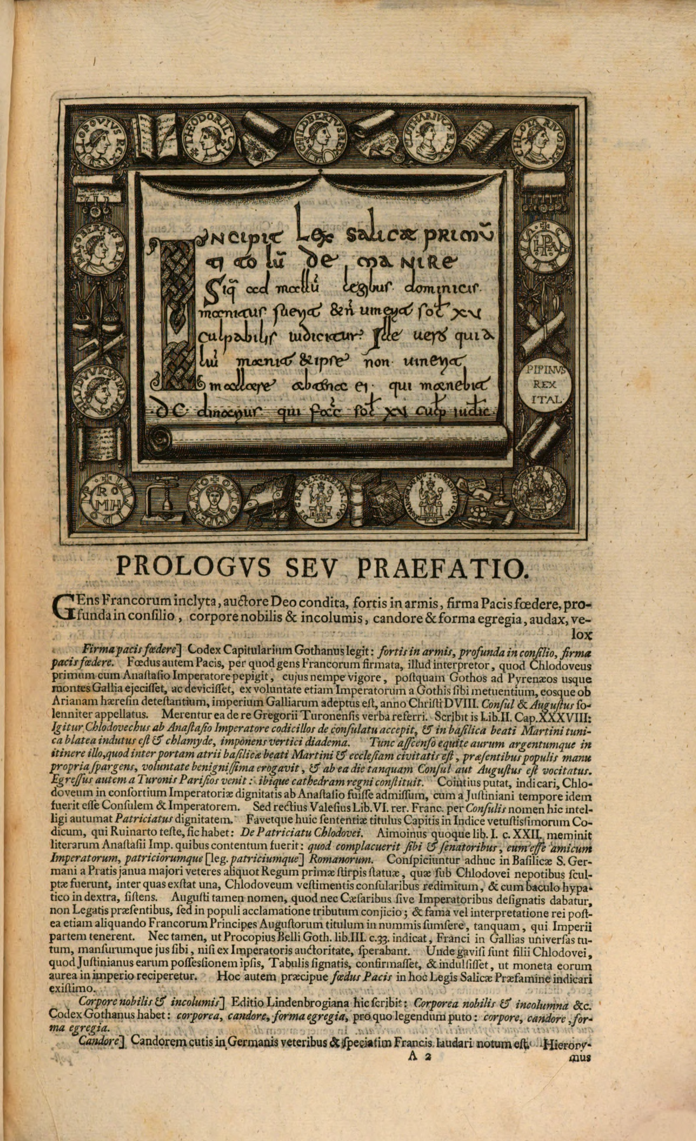 Leges Francorum Salicae et Ripuariorum, cum additionibus regum et imperatorum variis